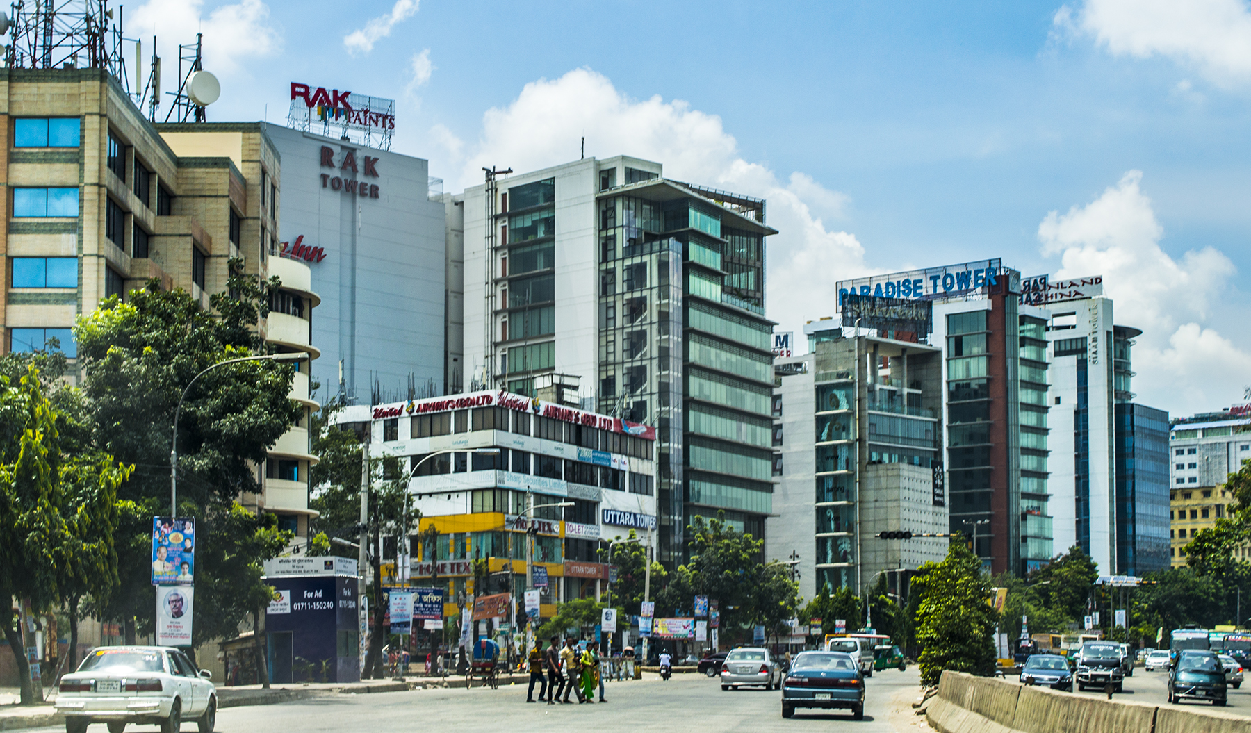 Dhaka